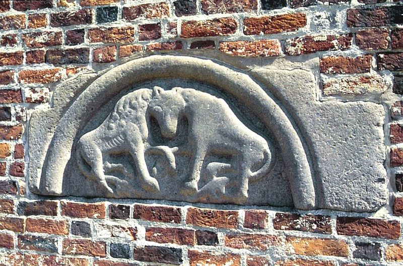 Tympanon indsat i nordmuren da: Tvilum Kirke